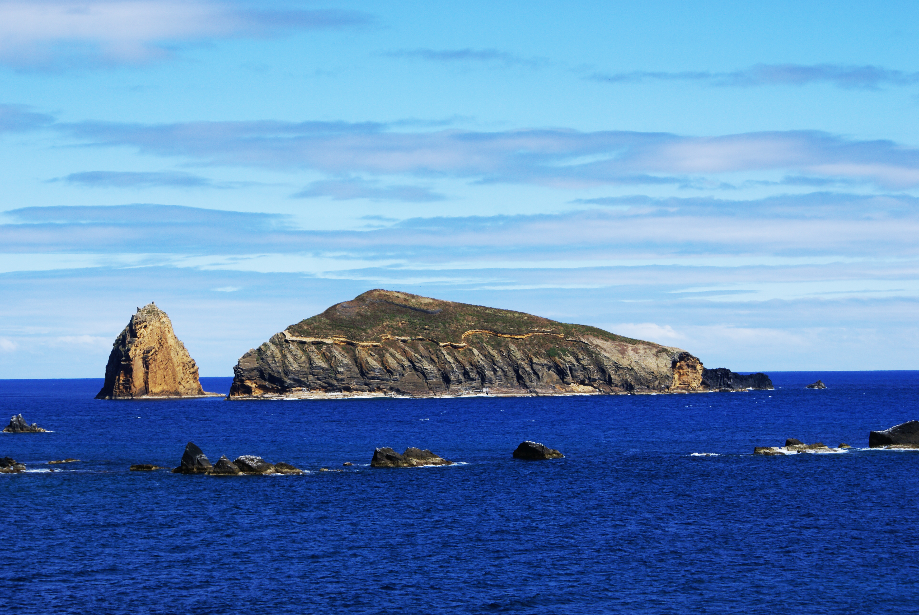 Ilhéu de Baixo, Carapacho, Santa Cruz da Graciosa, ilha Graciosa, Açores, Portugal